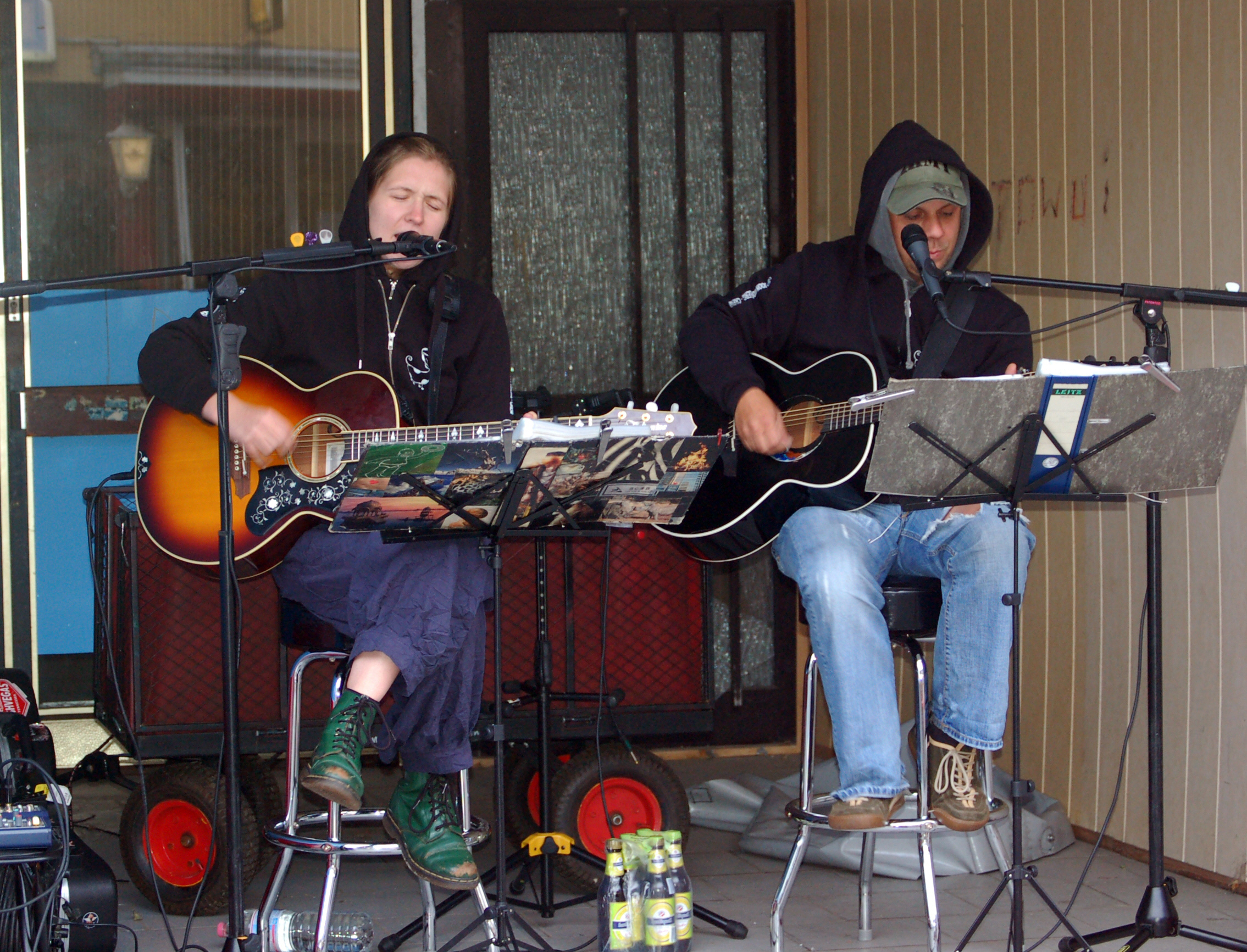 Joon Wolfsberg bei der 777 Jahr Feier der Stadt Uetersen.